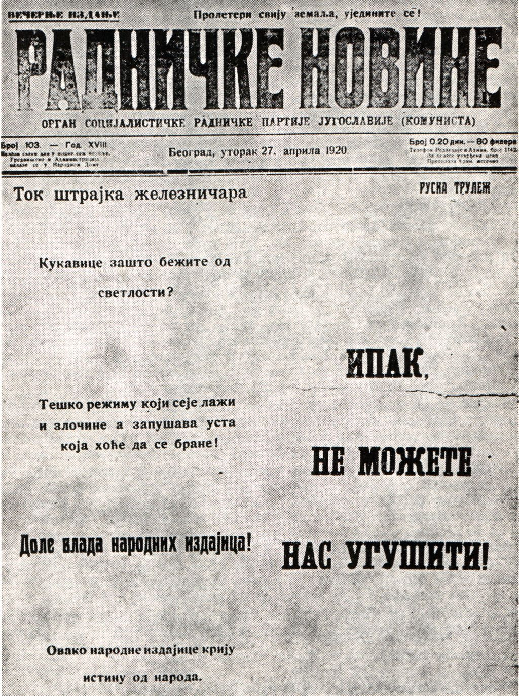 Насловна страница цензурисаних Радничких новина из 1920. године. Отпор цензури пружао се паролама против режима на обељеним страницама новина.